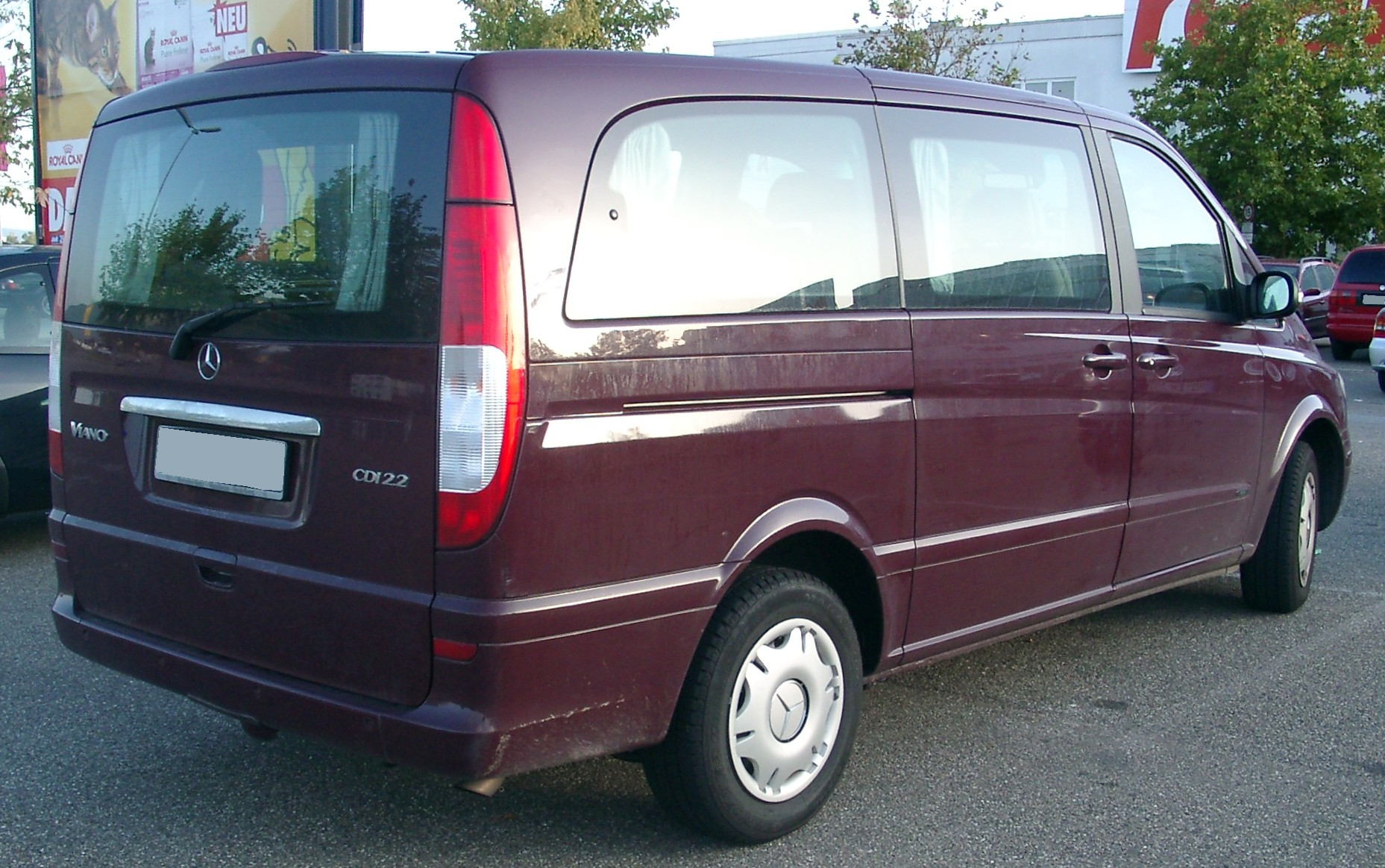 Mercedes Benz W639 (Viano)